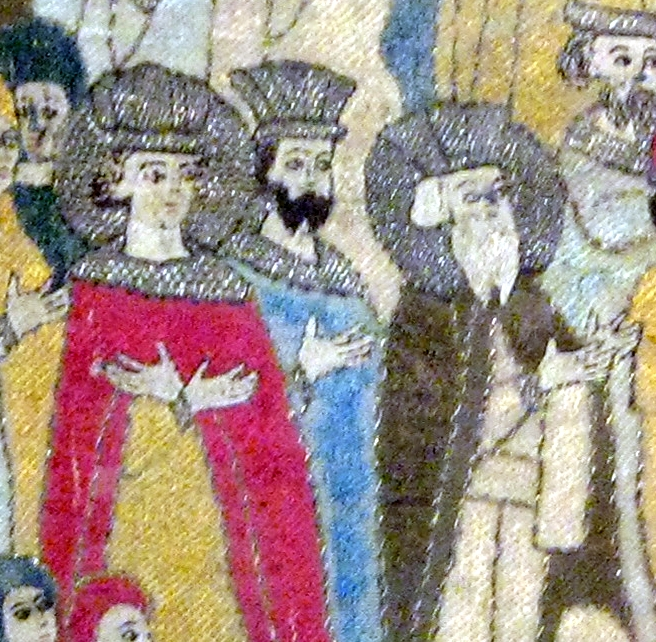 ПЕЛЕНА. ВЫНОС ИКОНЫ «БОГОМАТЕРЬ ОДИГИТРИЯ» Конец XV века Москва Мастерская Елены Стефановны Волошанки (?) Тафта, холст (крашенина), золотосеребряные пряденые нити, цветные шелковые нити; вышивка 95 х 98 (по большим сторонам) Поступила в 1905–1911 годах Находилась в коллекции М.М. Зайцевского, затем П.И. Щукина Реставрирована в 1925 году в ЦГРМ ГИМ инв. 15495щ РБ-5